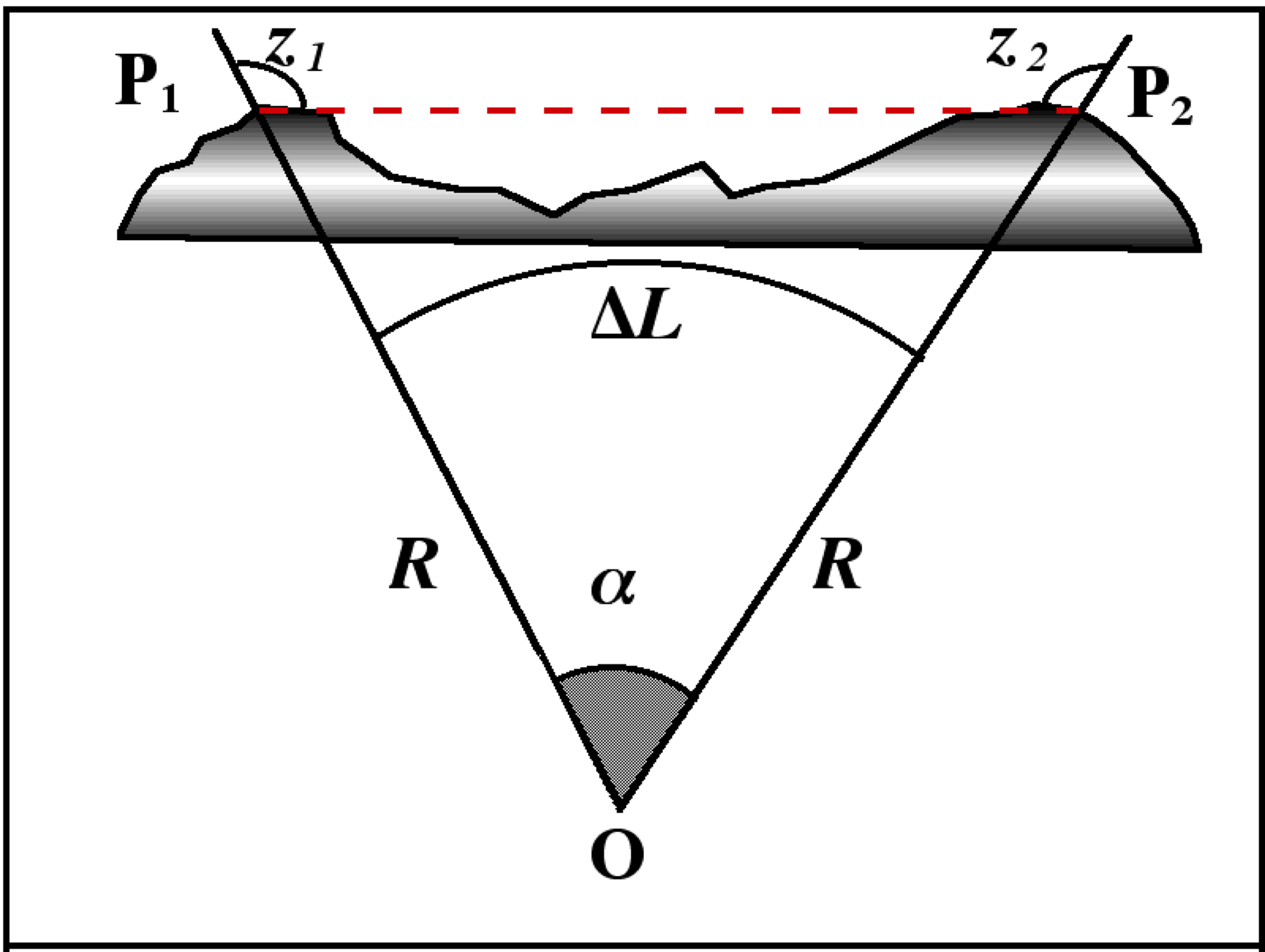 Better and higher resolution version of CD007-Méthode_de_Riccioli. The latter graphic may be deleted.